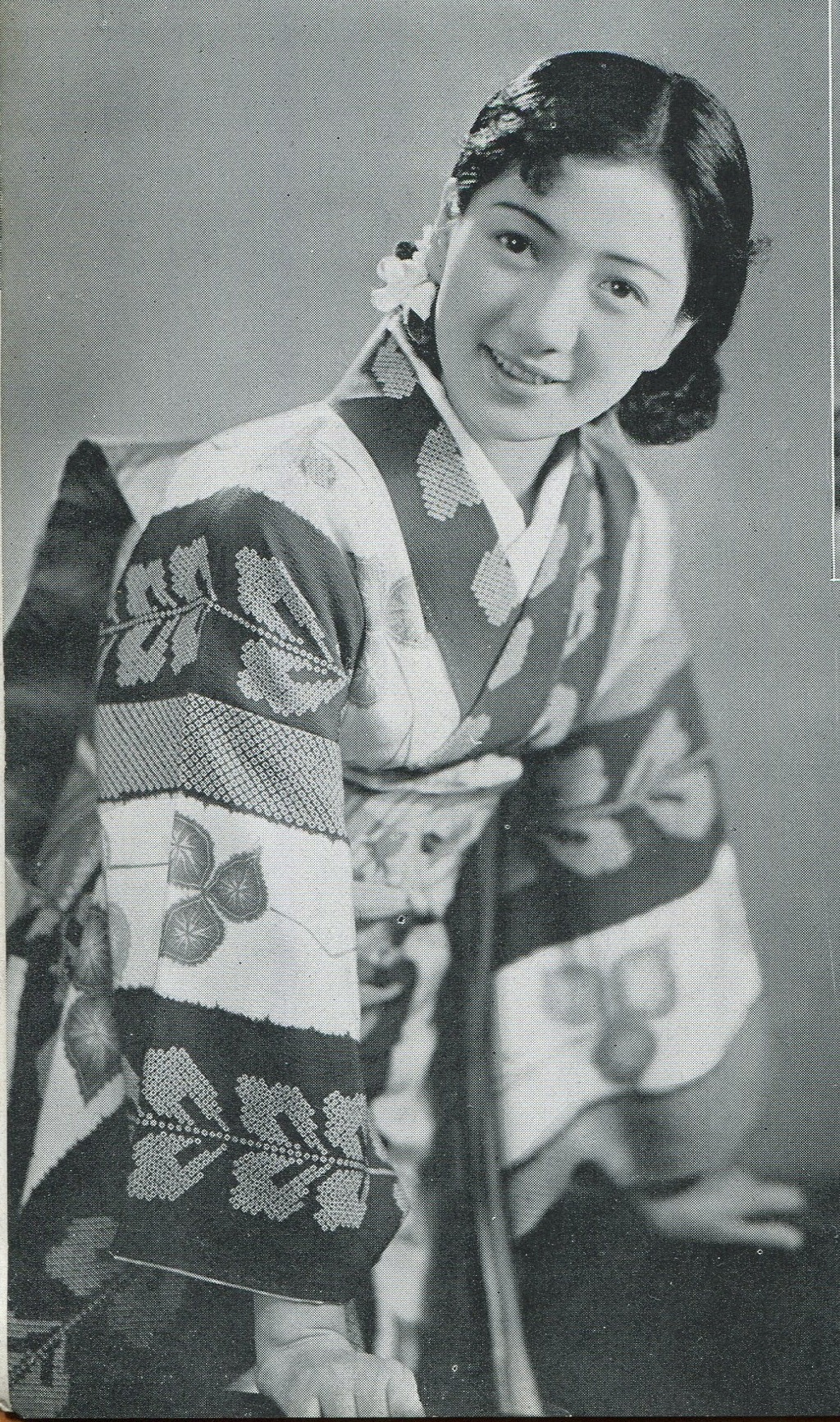 女優・轟夕起子の写真